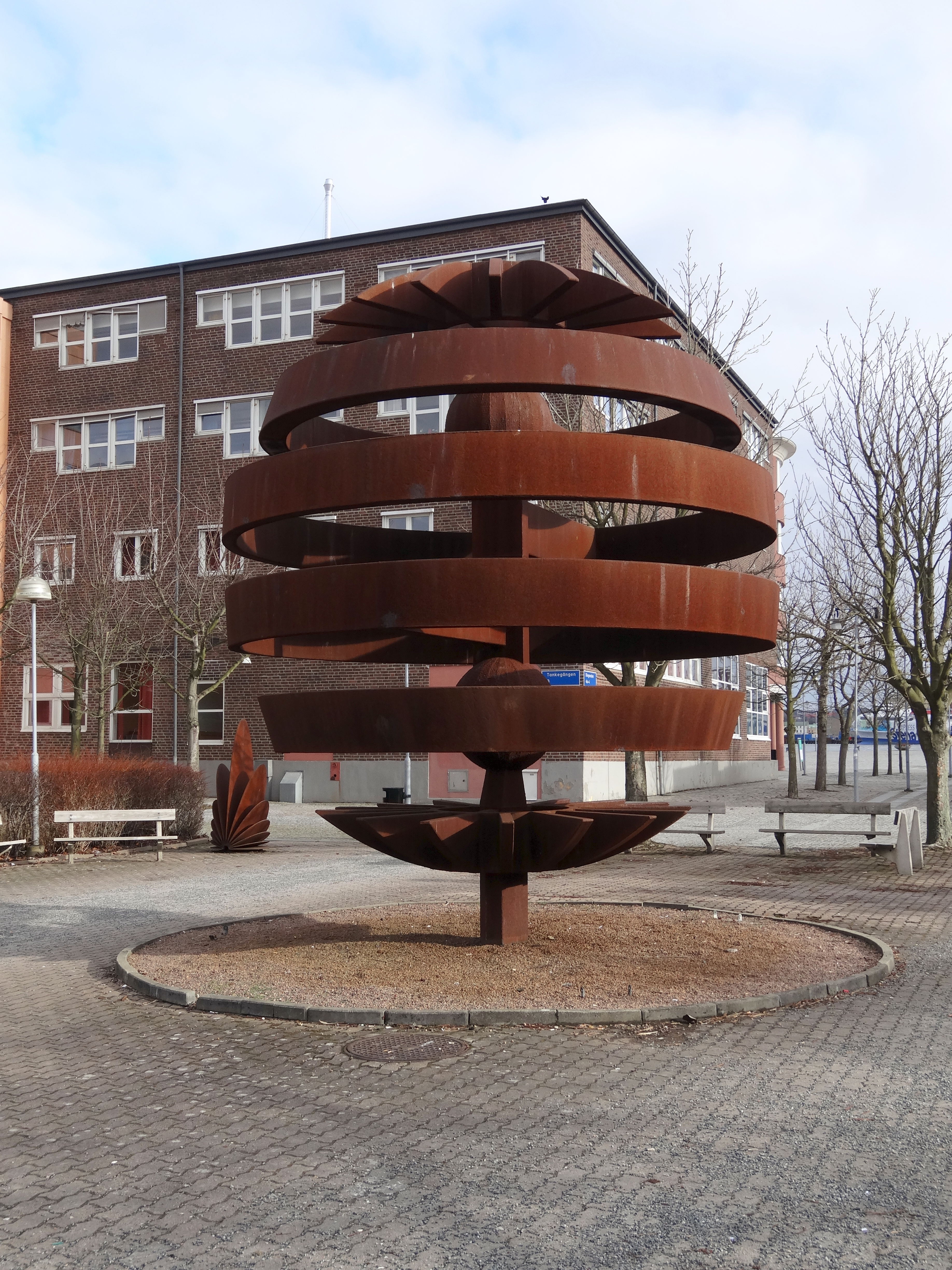 "Polaren" av Charles Brånå, 1980. Lindholmen, Göteborg.